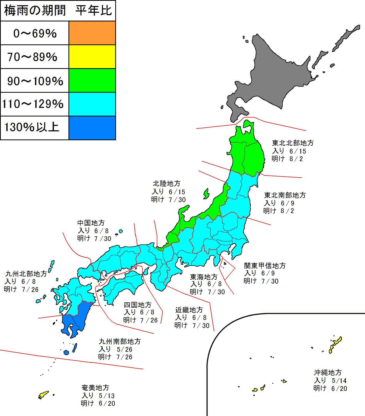 fromImage:Japan large.png. 2006年の梅雨入り・梅雨明けの図。青色の部分が梅雨入りした地域。発表のたびに随時更新。